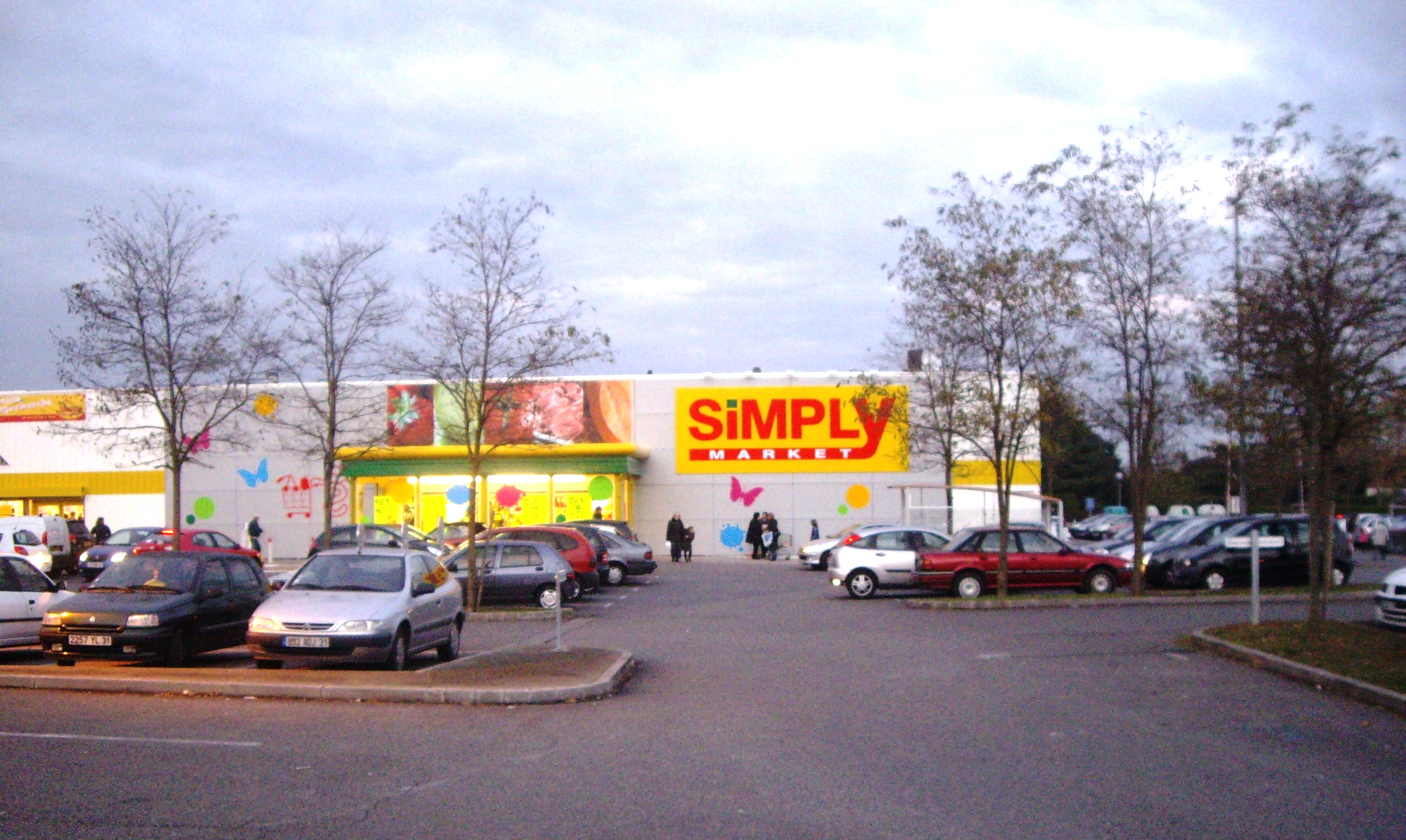 centre commercial Les Pins au petit Fonbeauzard